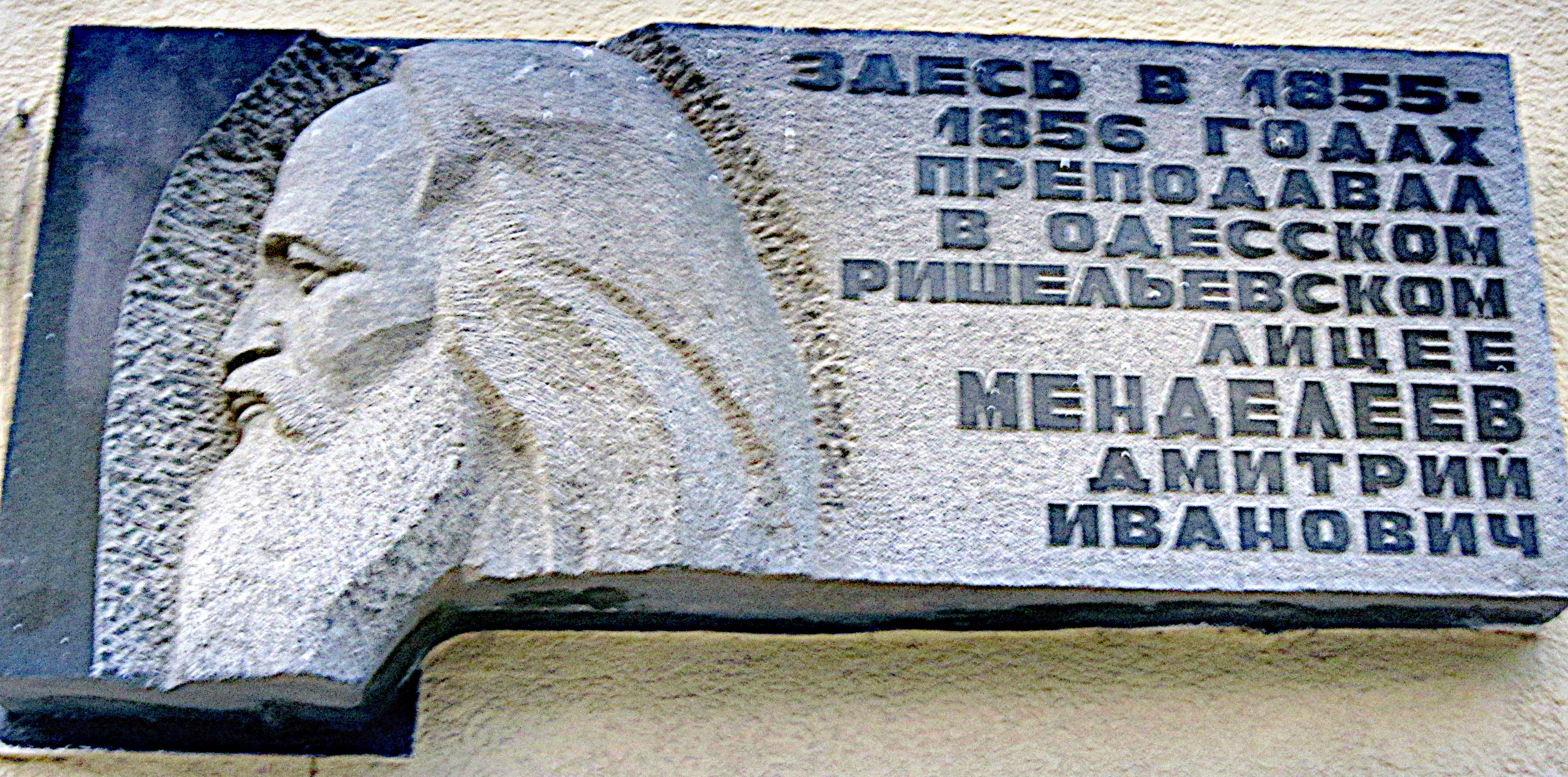 Будівля Рішельєвського ліцею (будинок Вагнера), у якому:- жив А. Міцкевич - польський поет; - викладав Д.І. Менделєєв - російський вчений-хімік, Одеса, Дерібасівська вул., 16/14/17 (ріг вулиць Дерібасівської, 16, Катерининської, 14 та Ланжеронівської, 17)